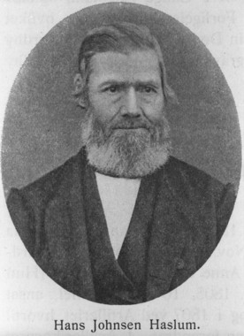 Hans Johnsen Haslum Eier: Akershusbasen